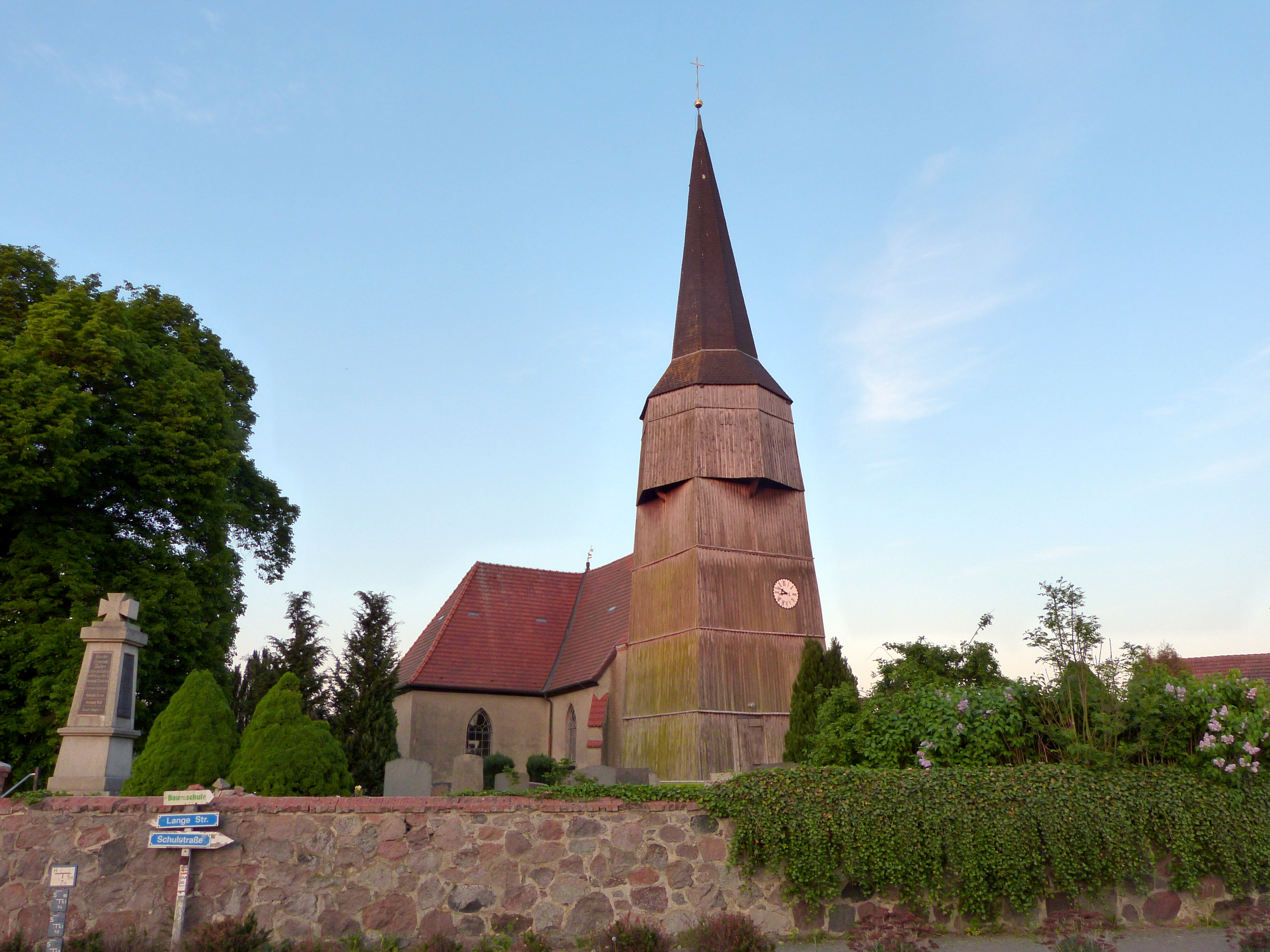 Bartow Vorpommern, Kirche, Gefallenendenkmal, Friedhofsmauer